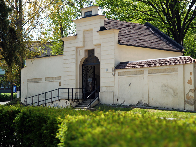 Kežmarok - Starý cintorín